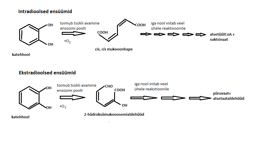 Katehhooli dioksügenaasid avavad tsükli ja liidavad hapniku mõlemad aatomid ainele külge, seejärel toimub veel rida reaktsioone kuni tekivad metaboolsete radada metaboliidid.